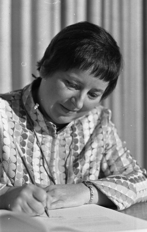 Signierung des Buches "Grob, fein und göttlich" durch die Autoren HAP [Helmut Andreas Paul Grieshaber] und Frau [Margarete] Hannsmann in der Landesvertretung Baden-Württemberg